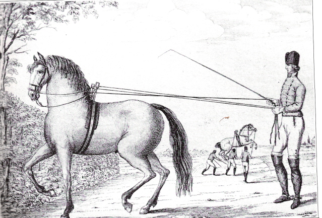 Equitation : Federigo Mazuchelli (1760-1830) Travail aux longues rênes, école italienne